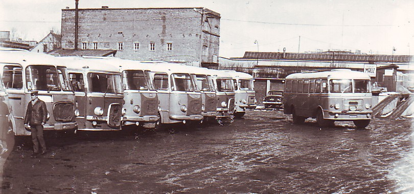 Stara zajezdnia PKS Nova Fabryczna